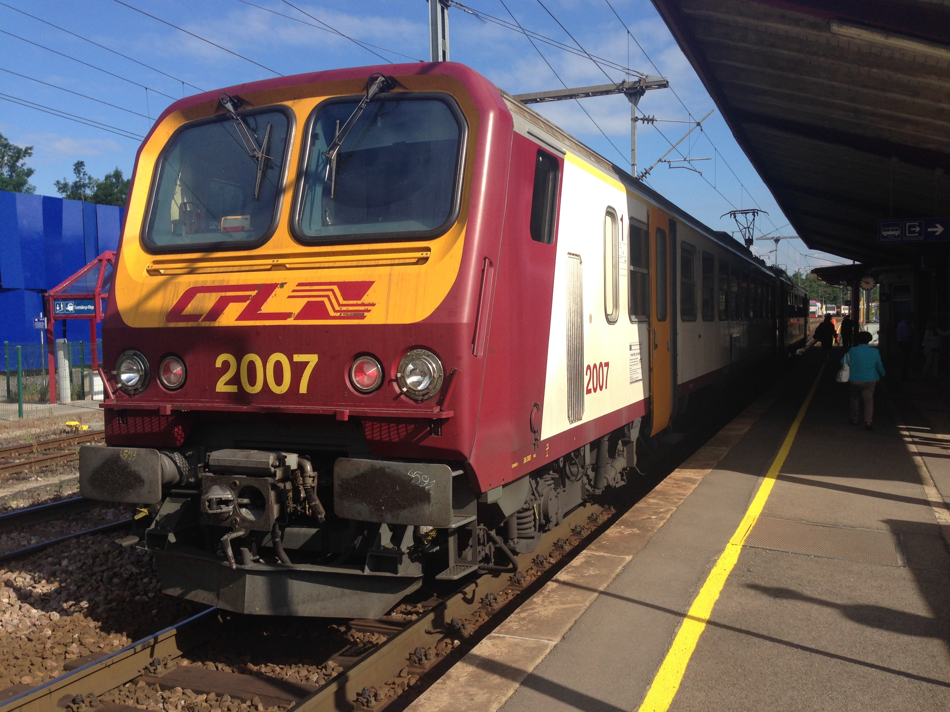 Bahnhof Diekirch in Luxemburg